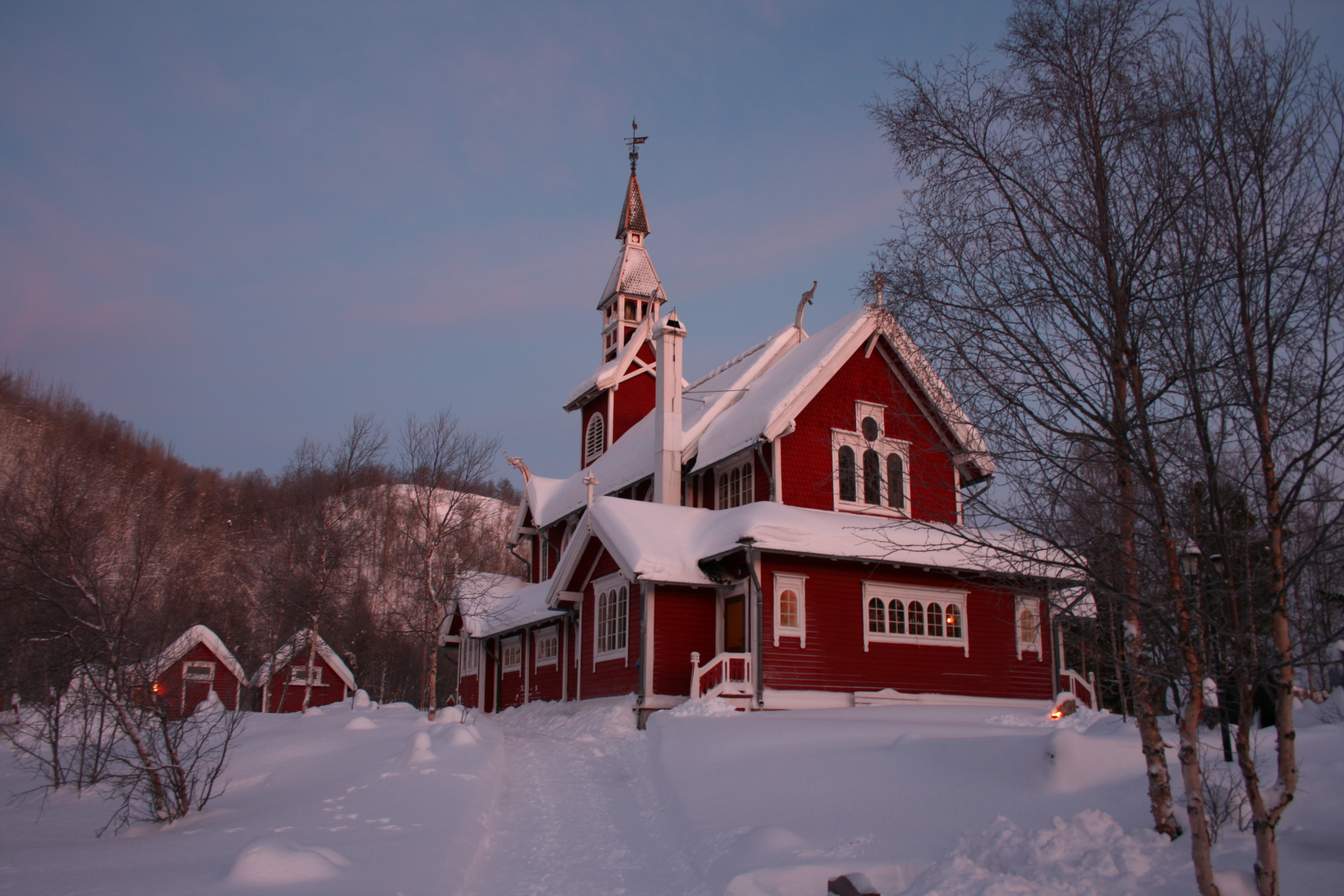 Neiden kirke (church) in Sør-Varanger, Norway